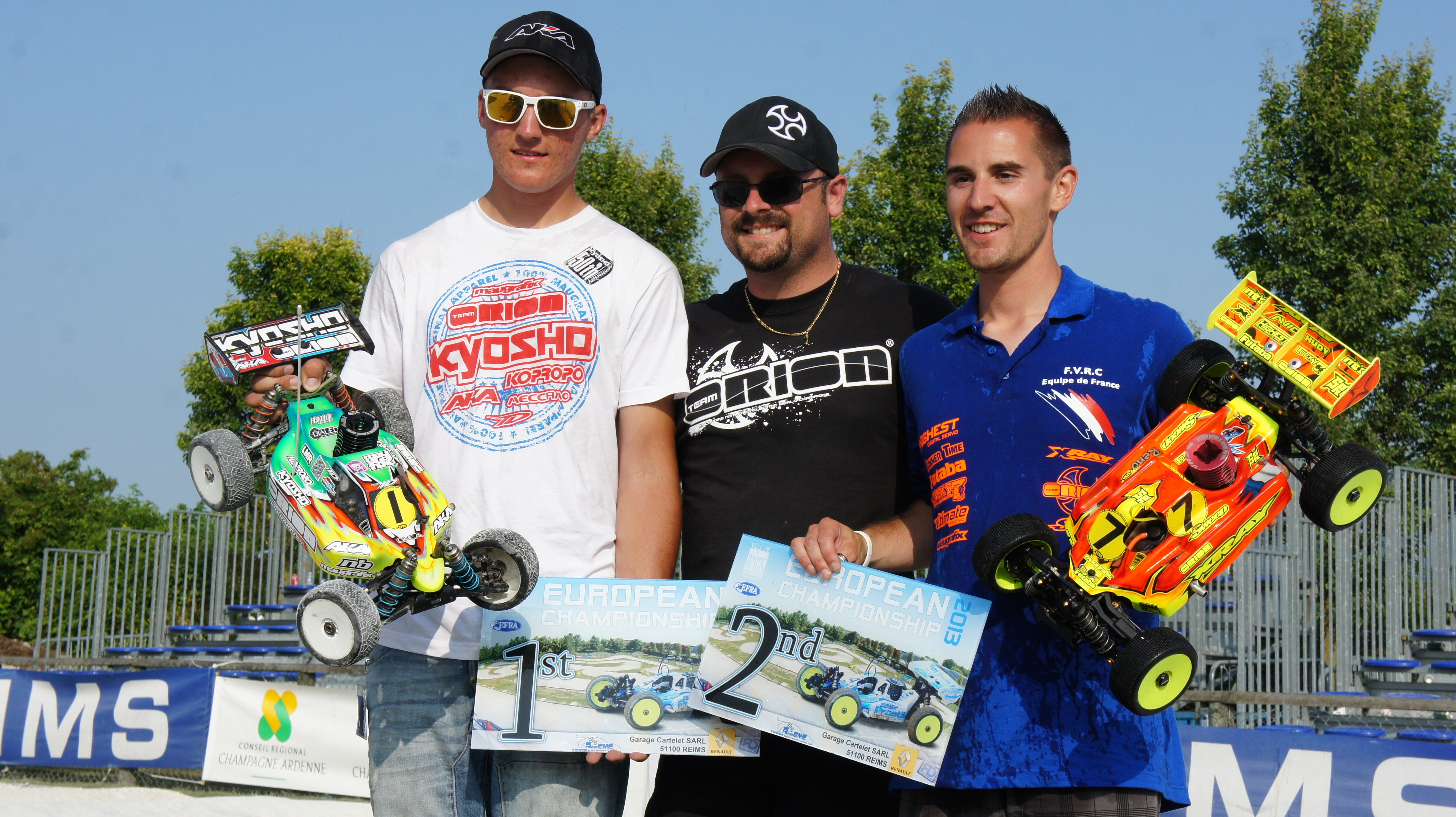 lE PREMIER ET LE SECOND avec le motoriste Orion .